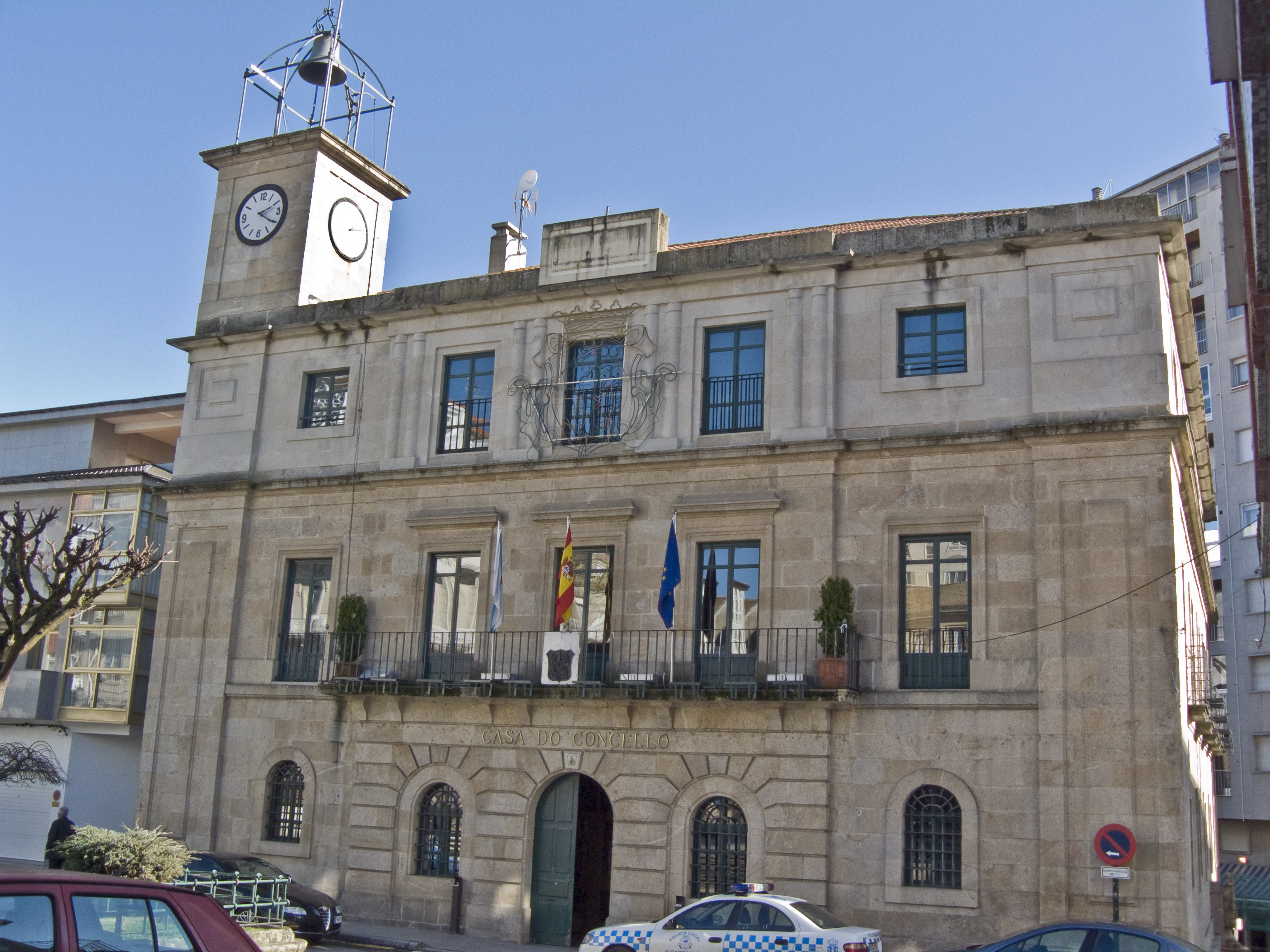 Casa do Concello do O Carballiño